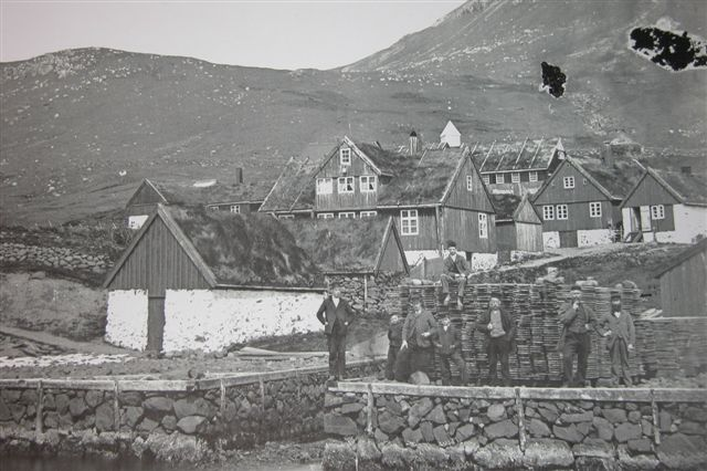 Tvøroyri 1890